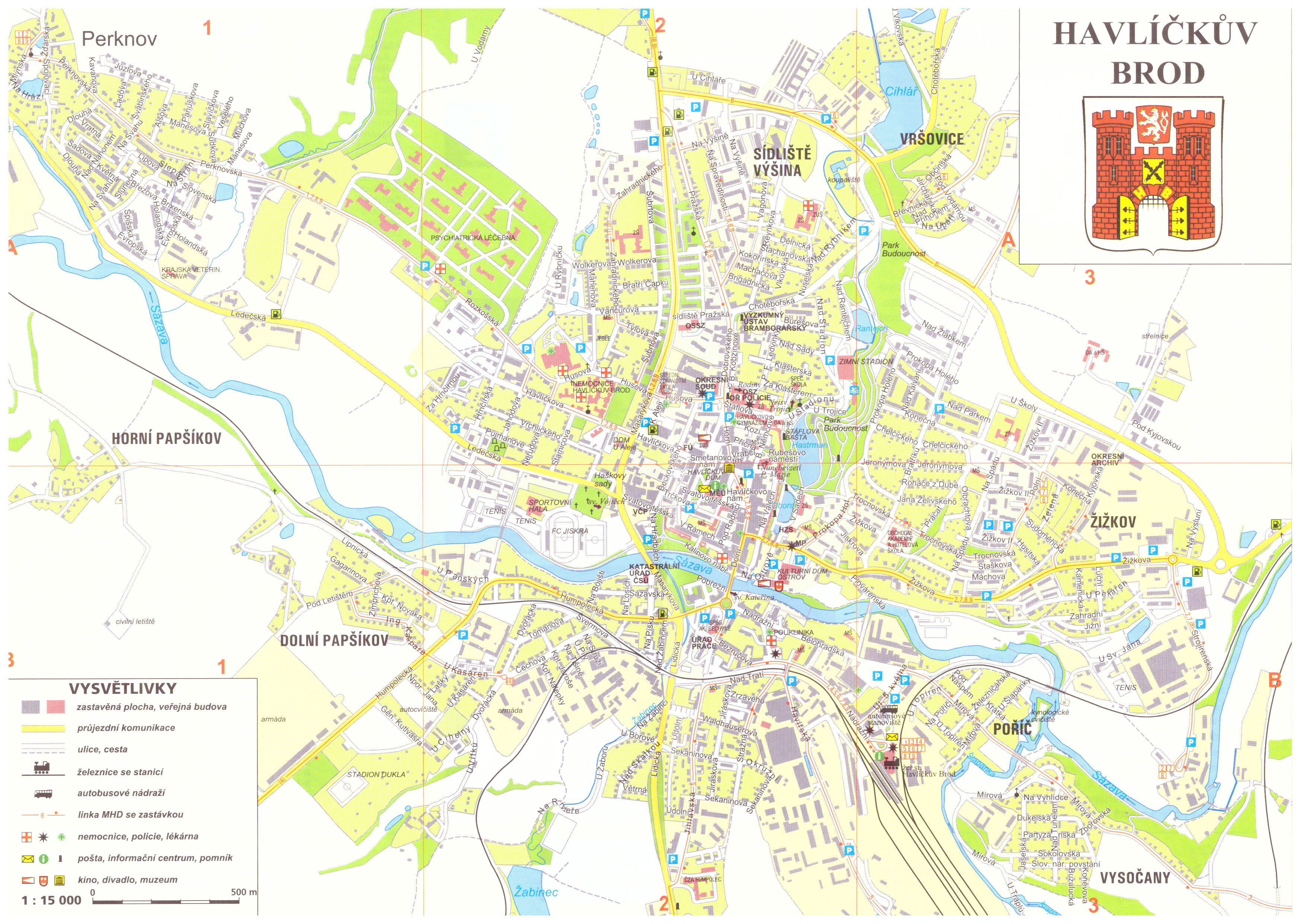 Autor informace Jiří Zelenka.Informační letáčky věnované tématu mapa Havlíčkova Brodu a okolí - I.díl. Nejsem autorem tohoto díla. Nelze ho proto volně šířit a nijak upravovat. Pouze se souhlasem majitele. Toto dílo je majetkem - Městského informačního centra Havlíčkův Brod Havlíčkovo náměstí 57, 580 01 Havlíčkův Brod 1. Město Havlíčkův Brod. Kraj Vysočina. Czech Republik.